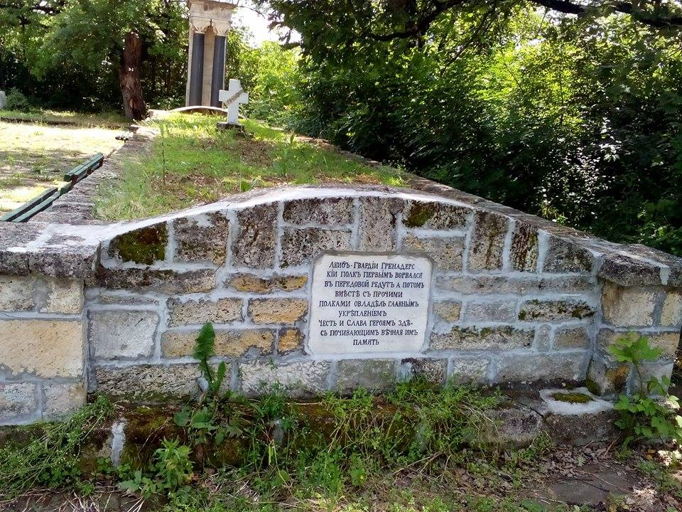 десният гроб на войниците от лейбгвардейски гренадирски полк - загинали на 24.10.1877 г. при атаката на турския редут при Горни дъбник